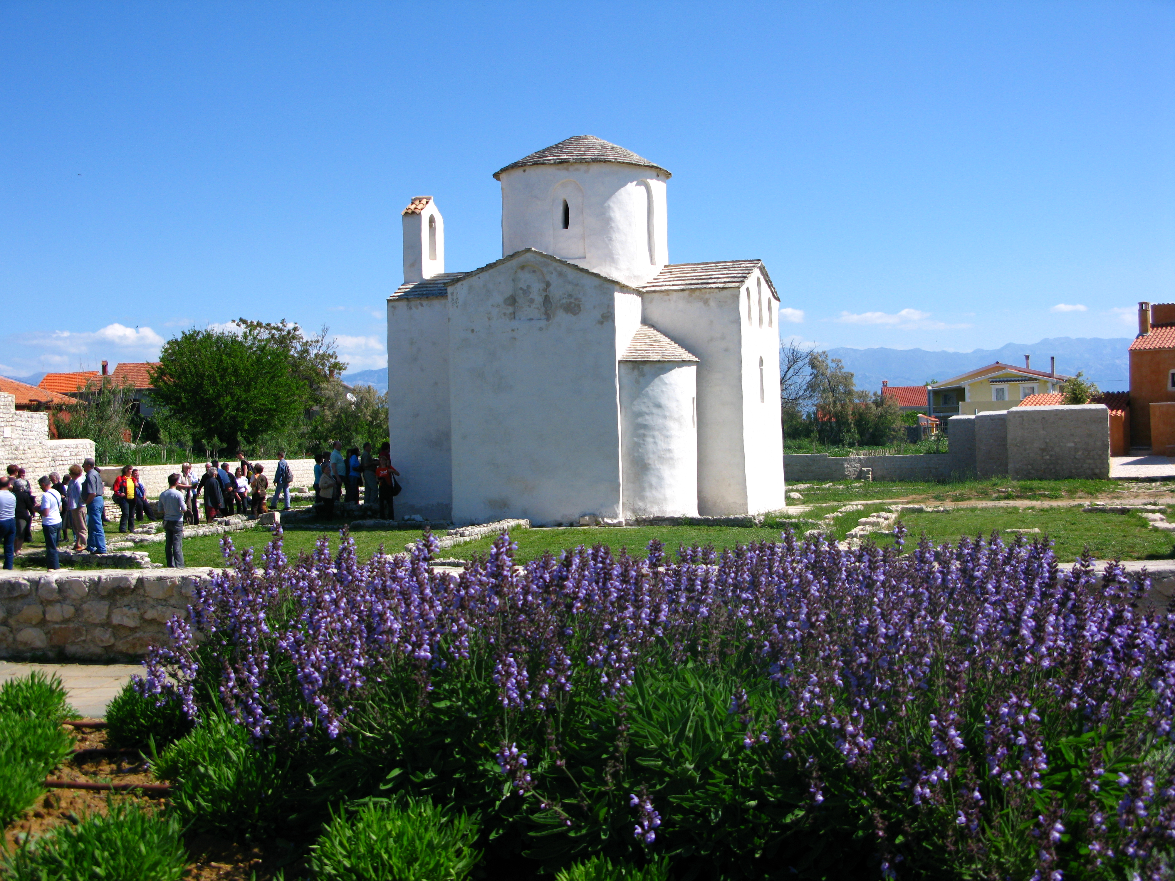 Crkva sv. Križa u Ninu,Hrvatska.